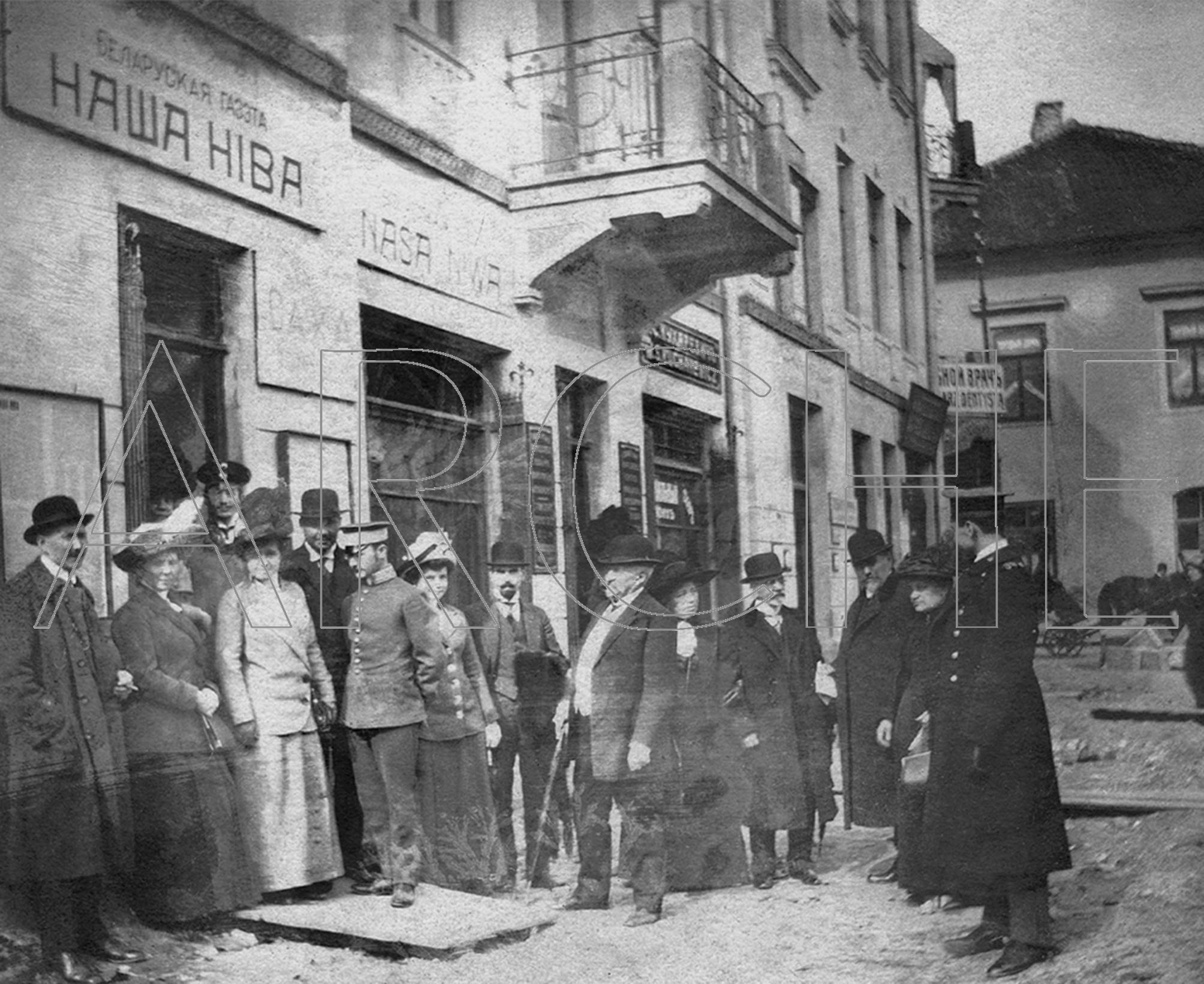 Супарцоўнікі і наведнікі газеты «Наша Ніва» каля будынку рэдакцыі на Завальнай вуліцы (цяпер — Pylimo) ў Вільні. Фота 1910-х гг. З фондаў БДАМЛМ